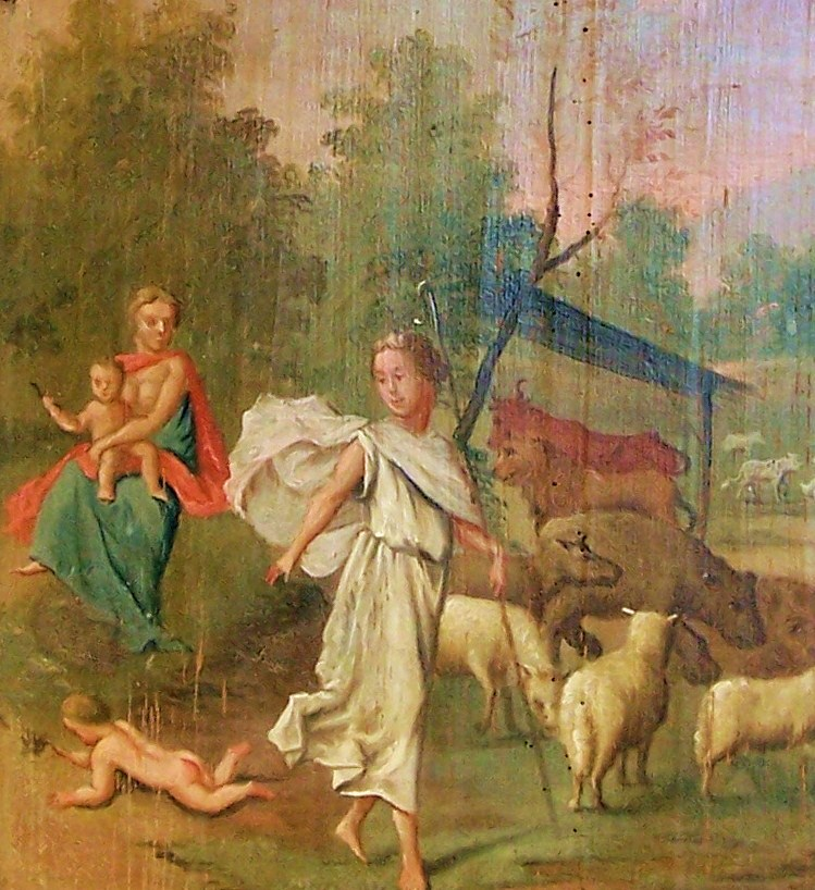 Ludwig Müller, Bild aus der Kirche in Grundhof